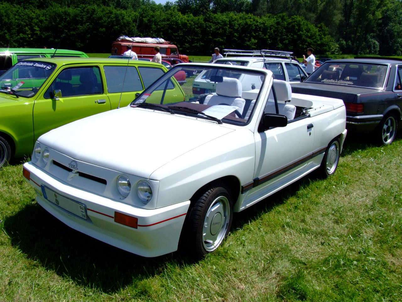 Opel Corsa Spider i120 Baujahr: 1982 55 PS 1,2 Liter Motor/Engine